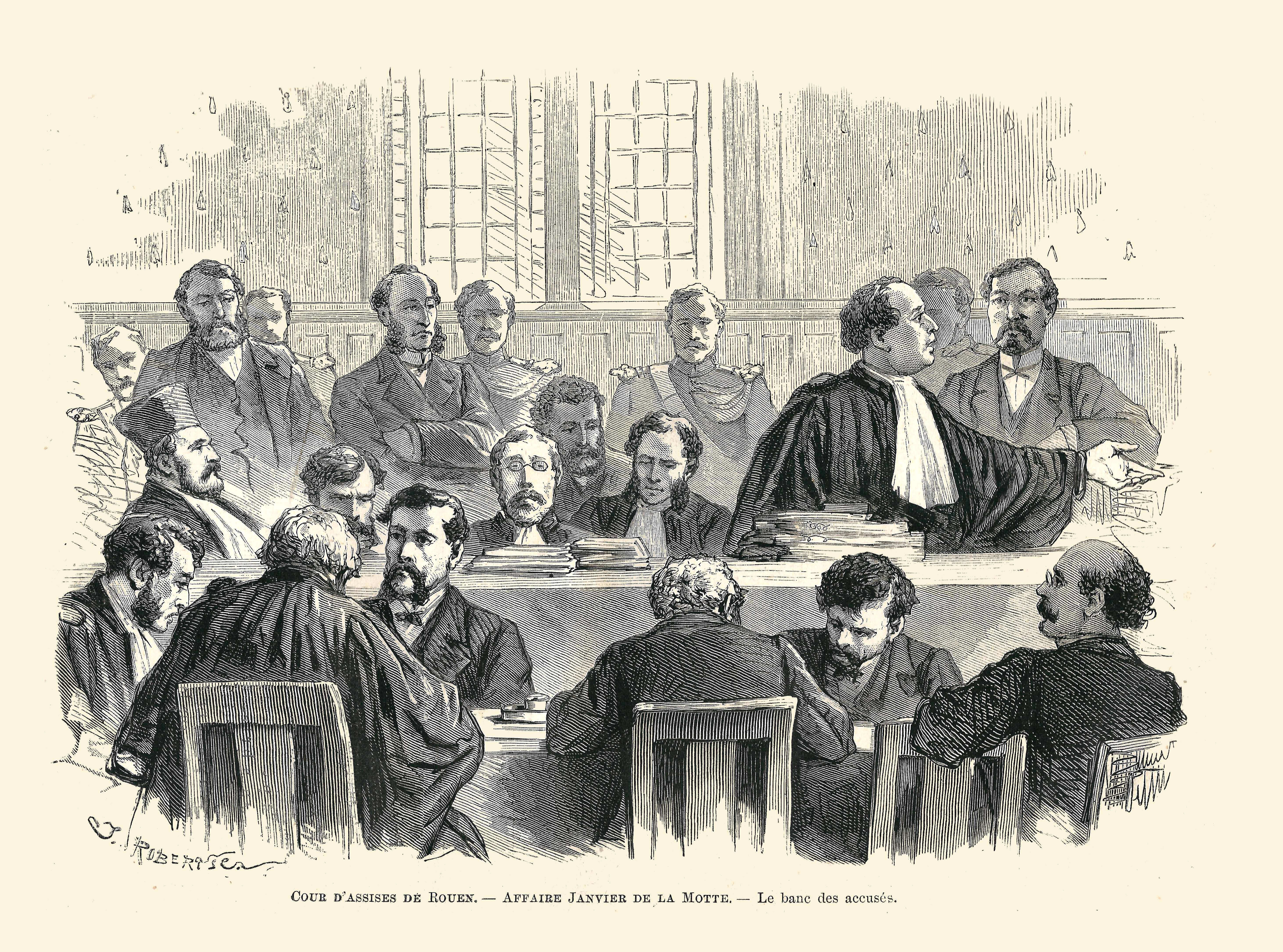 Cour d'assises de Rouen qui siège dans le procès de l'Affaire Janvier de La Motte en janvier 1872 : Le banc des accusés.